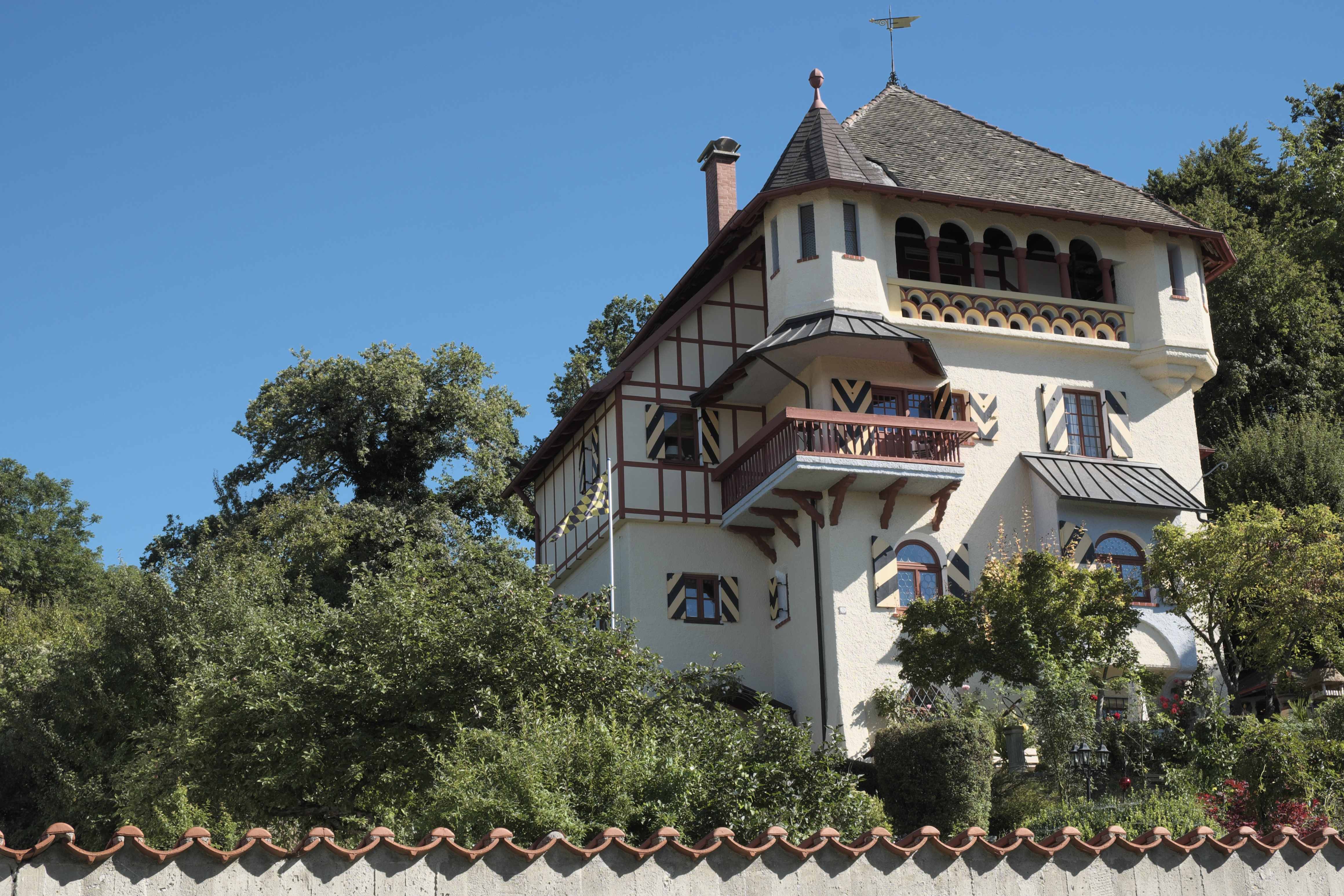 Villa Kraus in Walchstadt, einem Ortsteil der Gemeinde Wörthsee im Landkreis Starnberg (Bayern/Deutschland)